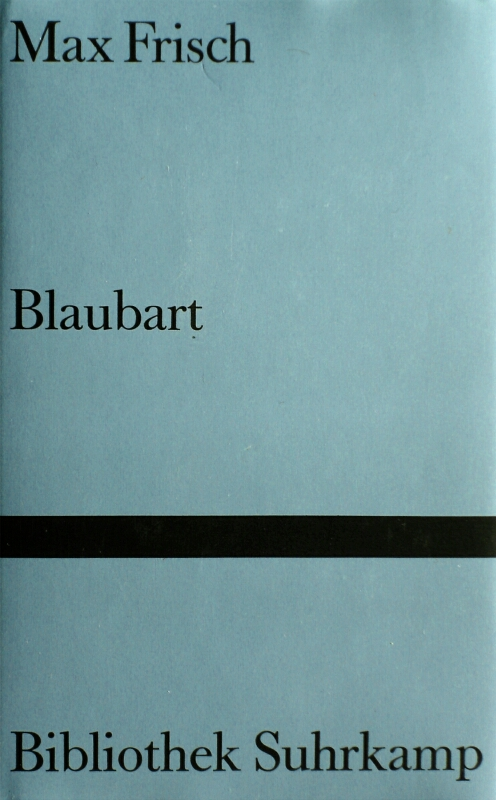 Buchcover Blaubart von Max Frisch in einer Ausgabe der Bibliothek Suhrkamp